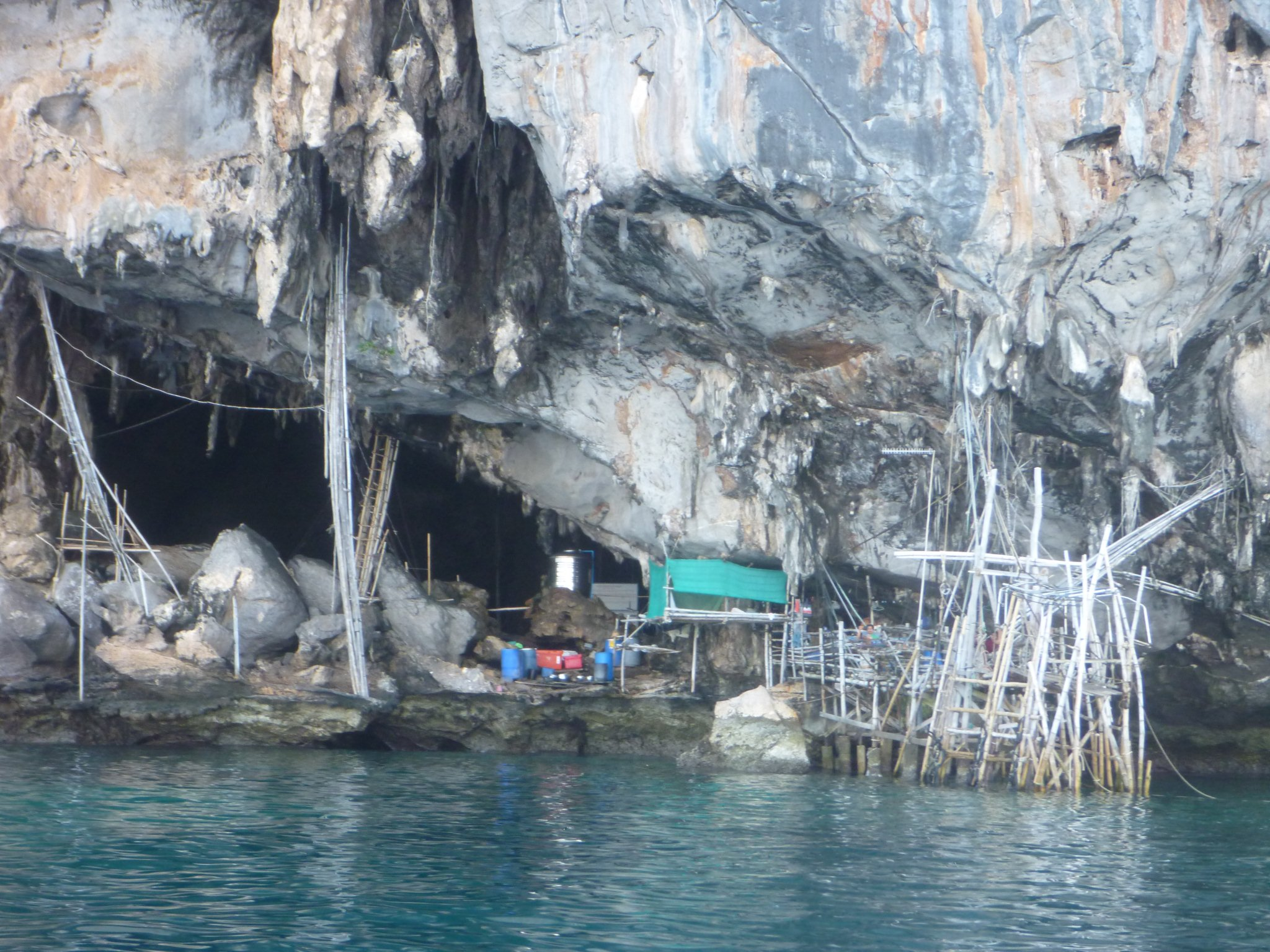 Phi Phi Island Tour